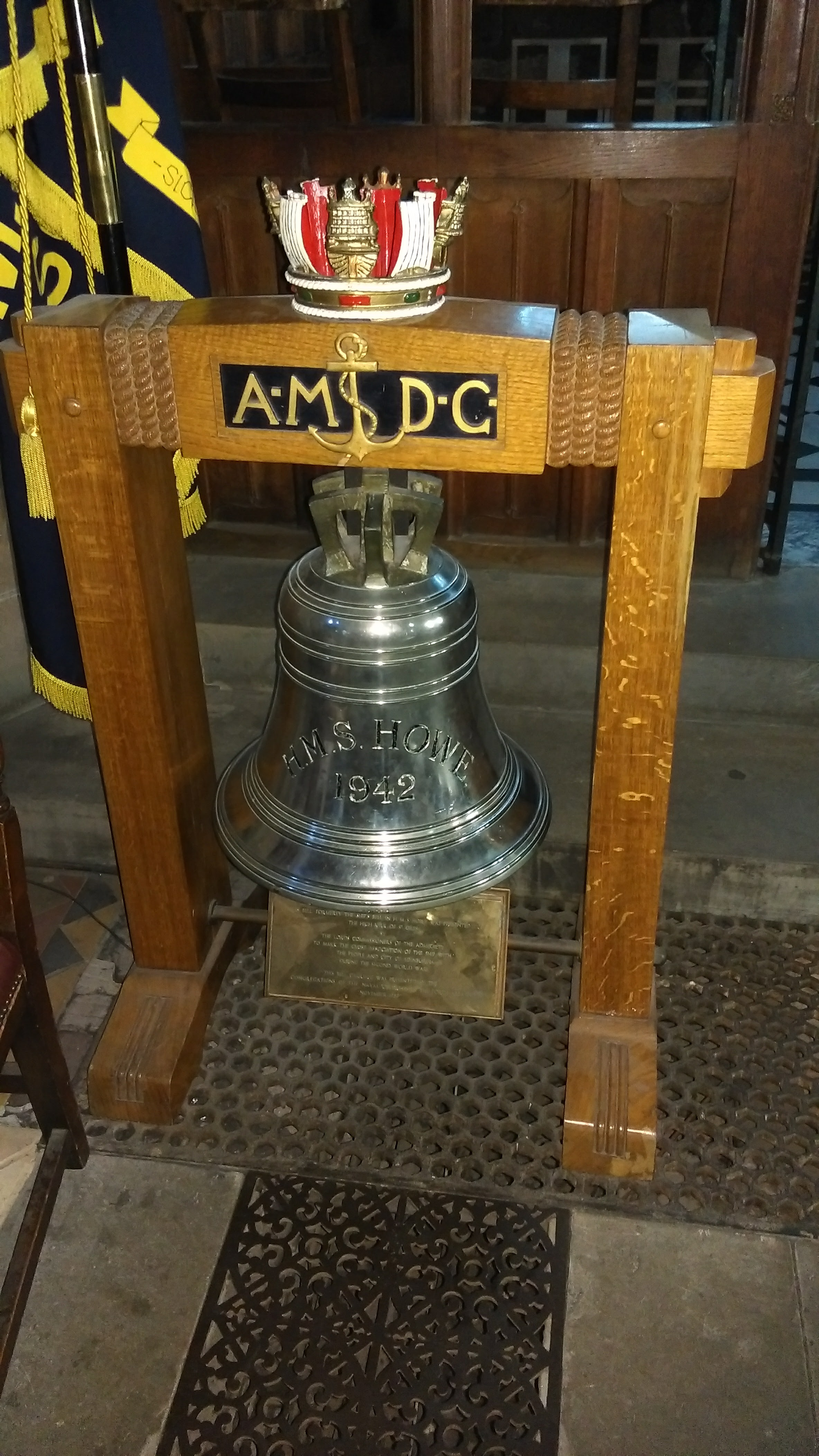 Bell of the HMS Howe at the St. Giles Cathedral in Edinburgh